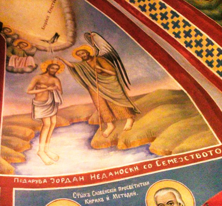 Фреска Крштение Христово во црквата „Свети Илија“ во охридско Рамне